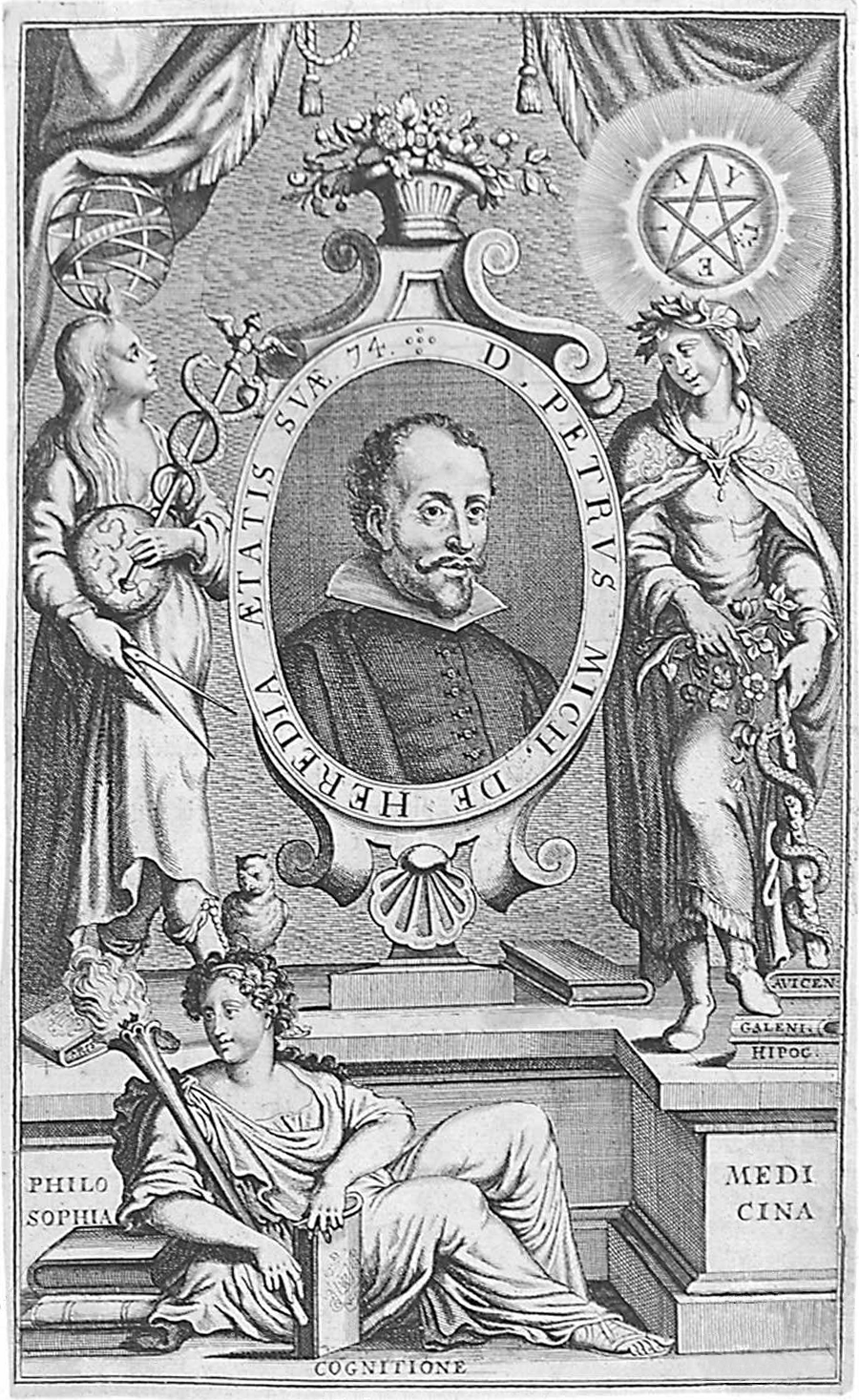 Pedro Miguel de Heredia (1579 - 1655) médico español, catedrático de la Universidad de Alcalá, médico de cámara de Felipe IV. Retrato en la edición de 1664 de su libro, en 4 volúmenes, Opera Medicinalia.